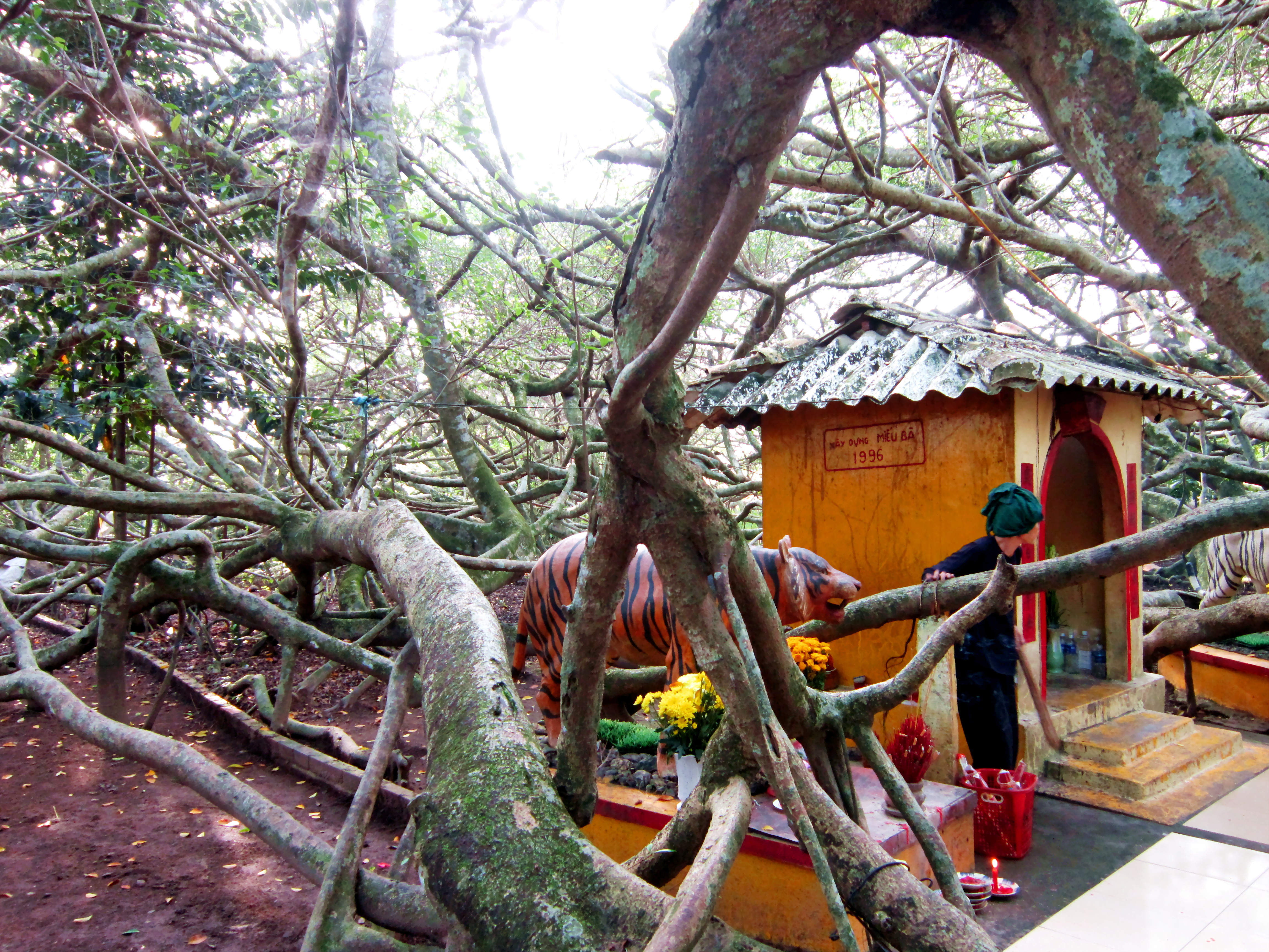 Cổng miếu thờ bà Thượng Động Cố Hỷ ở ấp Nhơn Khánh, xã Nhơn Nghĩa, huyện Phong Điền, thành phố Cần Thơ, Việt Nam.